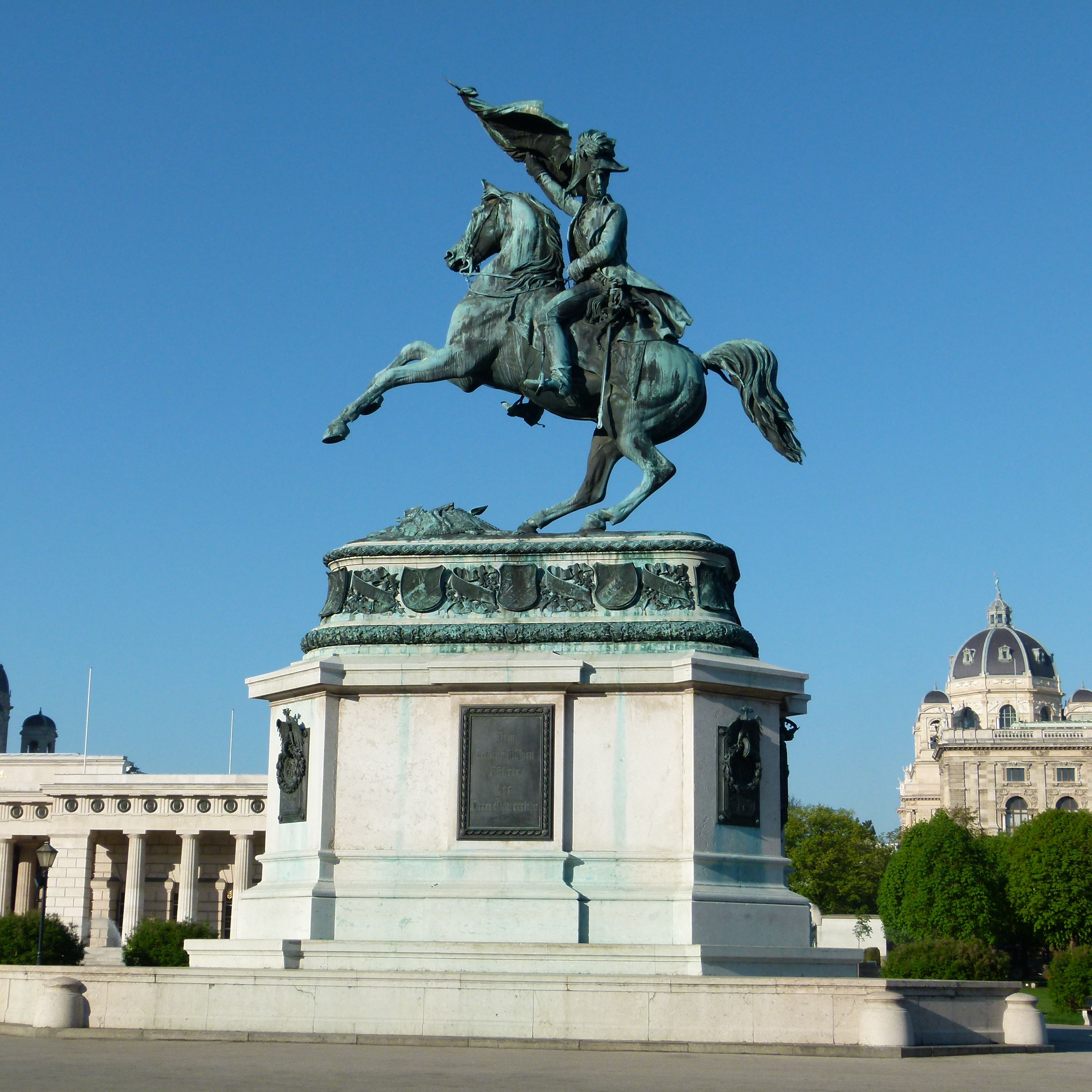 Erzherzog Karl - Denkmal